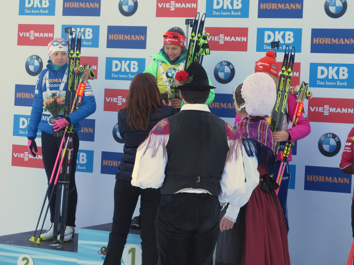 Svetovni pokal v biatlonu organizacijsko podpira tudi Slovenska vojska.